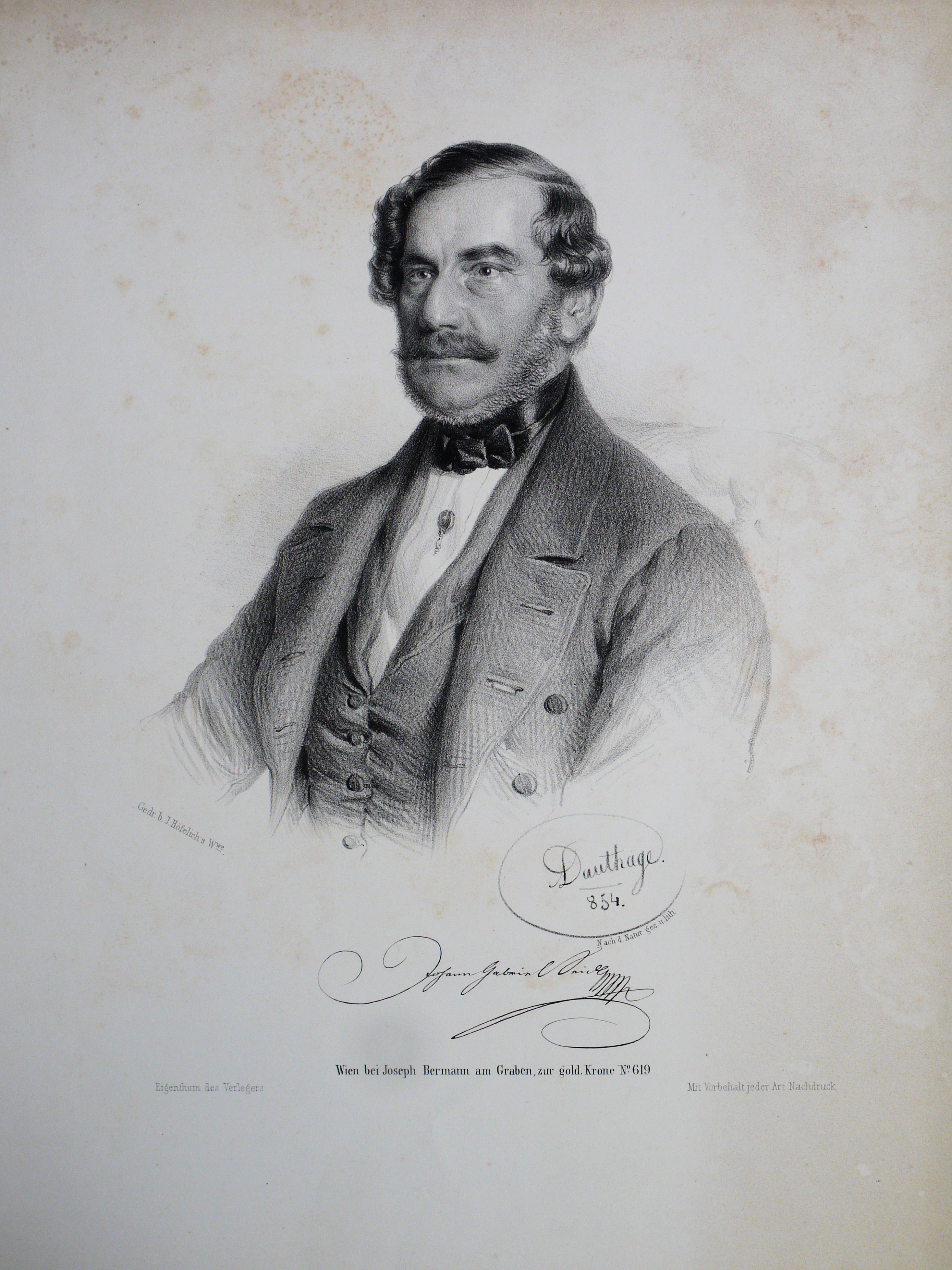 Johann Gabriel Seidl (1804-1875), Archäologe,Schriftsteller. Dichter der Kaiserhymne. Lithographie von Adolf Dauthage, 1854.